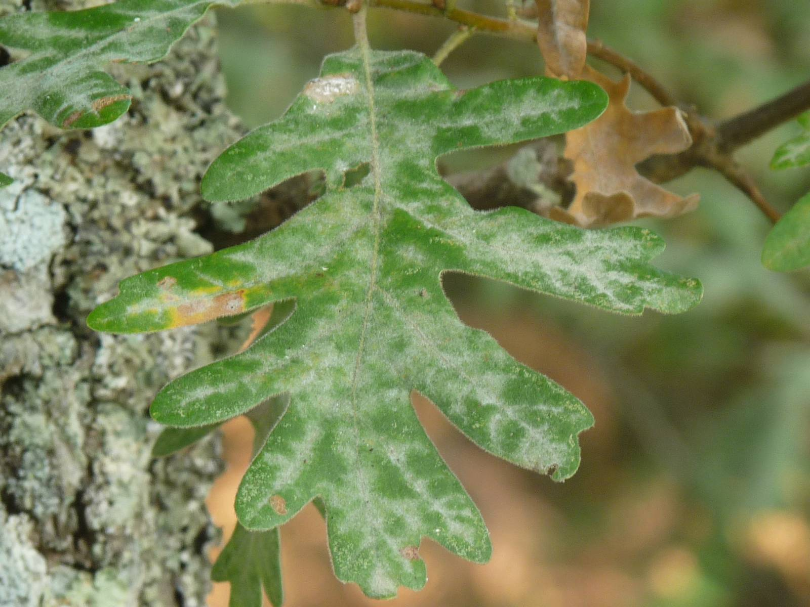 feuilles de chêne tauzin, dans la Double saintongeaise, Sauvignac (16), France